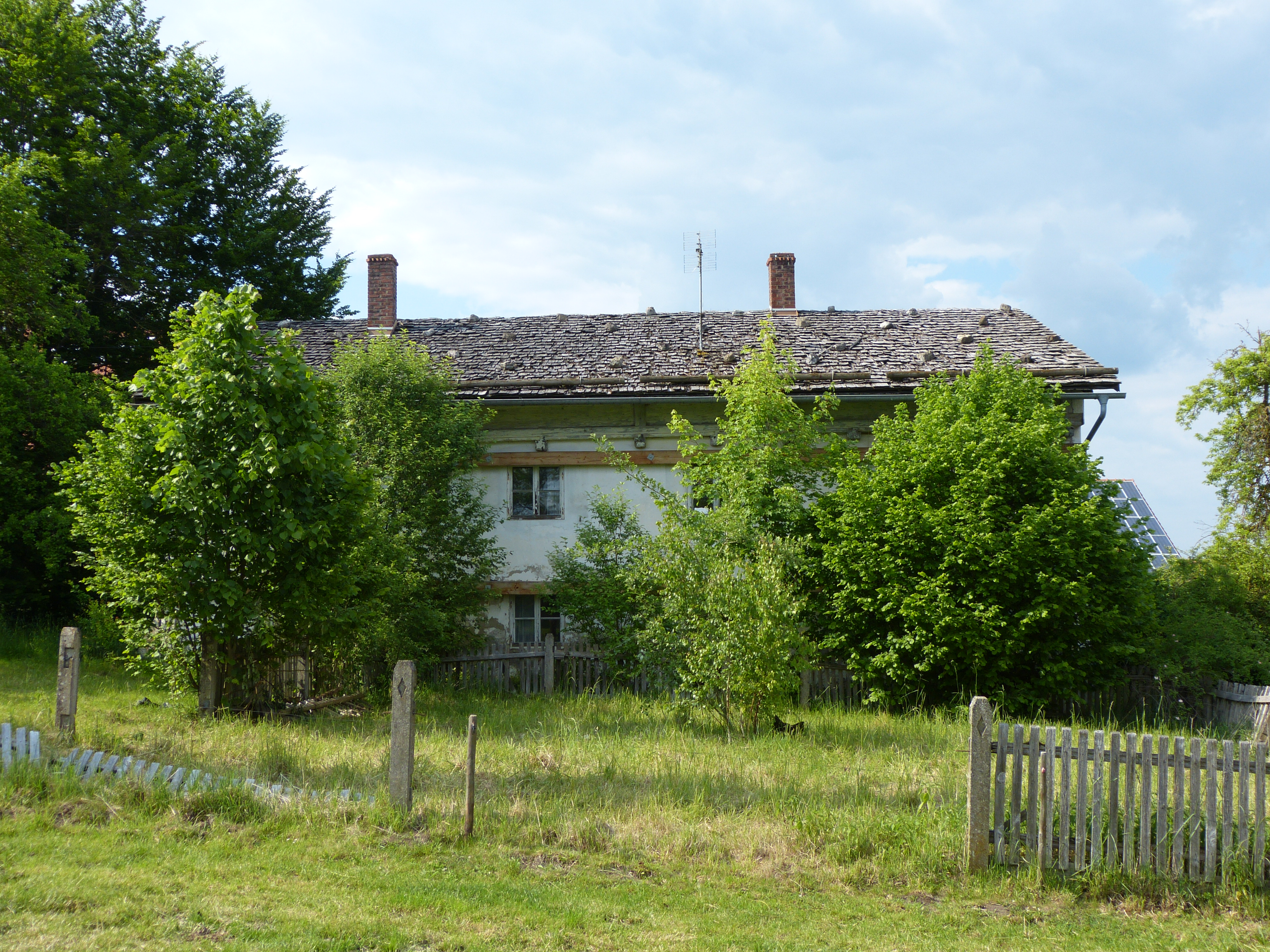 Baudenkmal im Landkreis Unterallgäu, Bayern